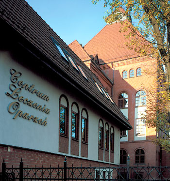 Szpital leczenia oparzeń w Siemianowicach